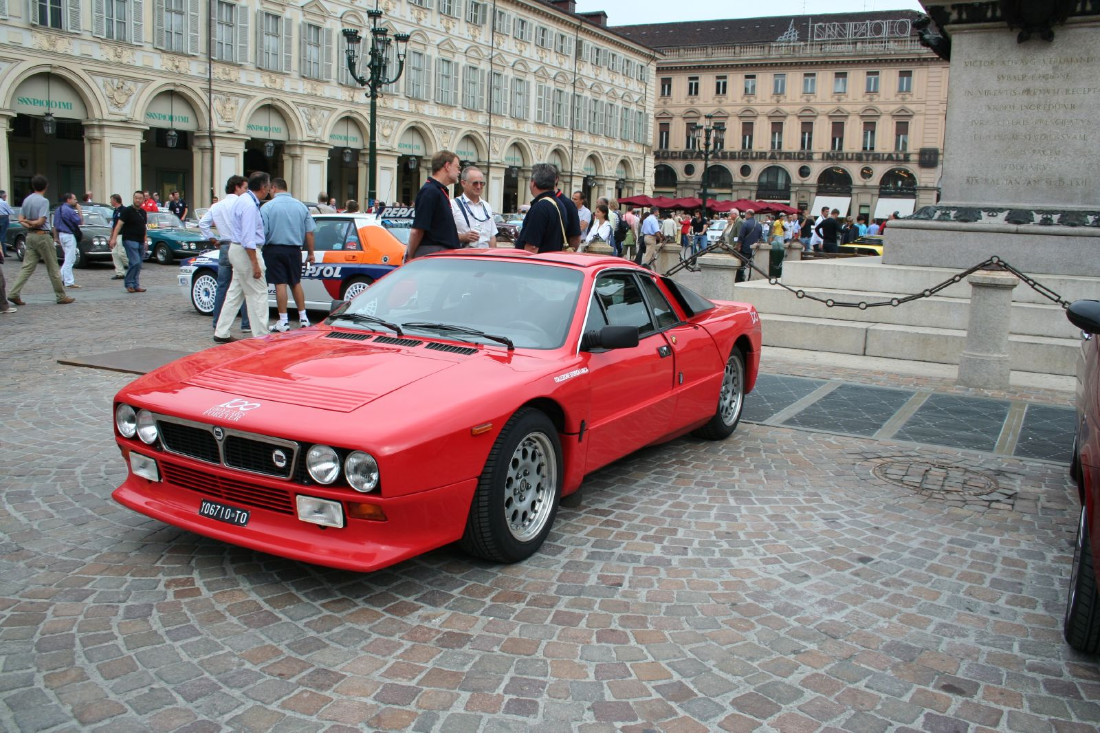 Lancia 037 en version stradale